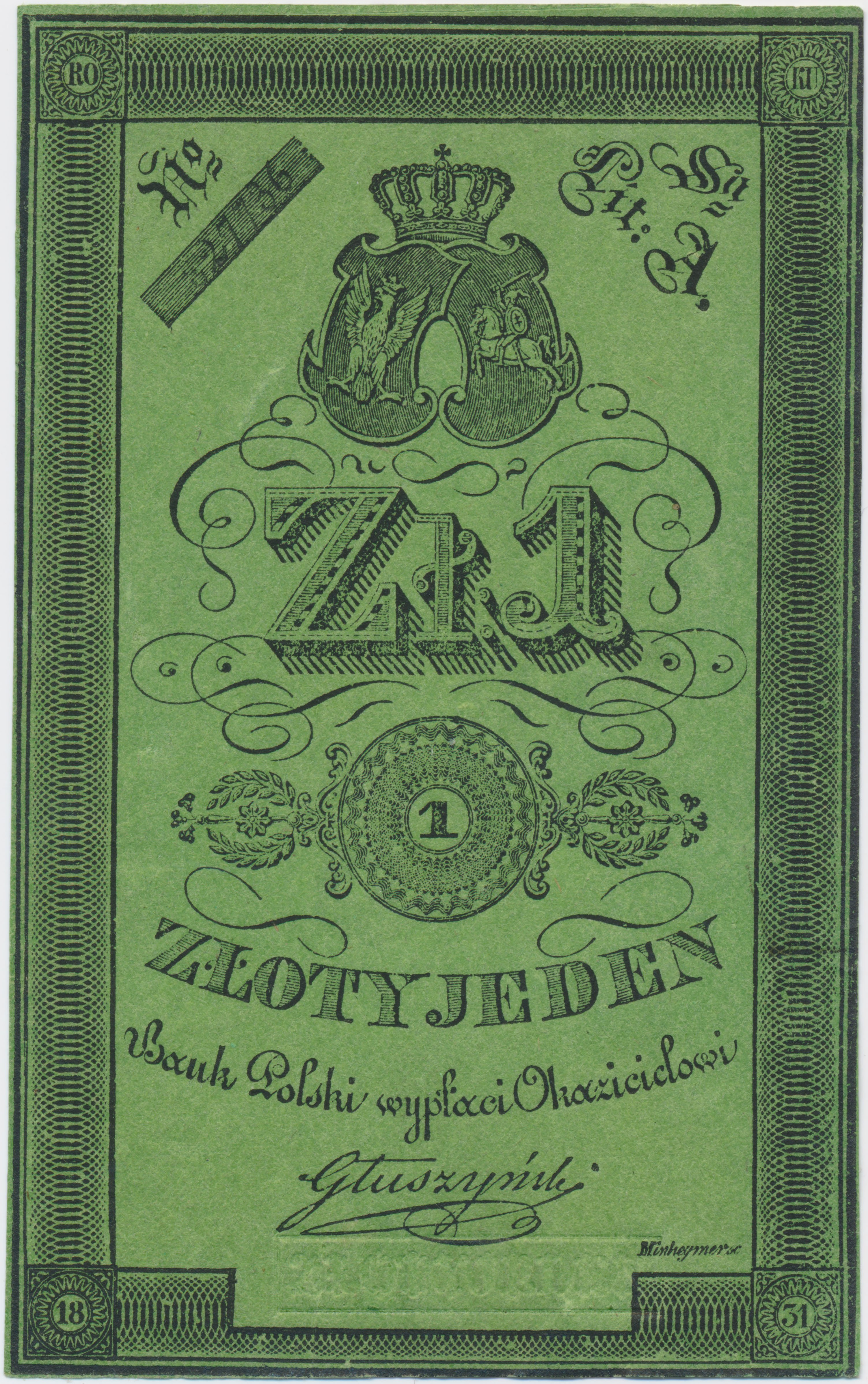 Banknot 1 złoty 1830 powstanie listopadowe